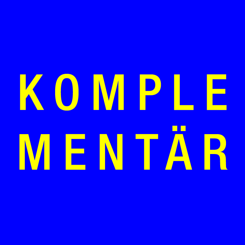 Darstellung von den Komplementärfarben mit Schrift in Gelb auf Blau.